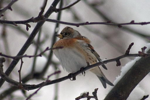 Fringilla montifringilla Photo made in Rumia, Poland, by Patrycja Kumiszcza.